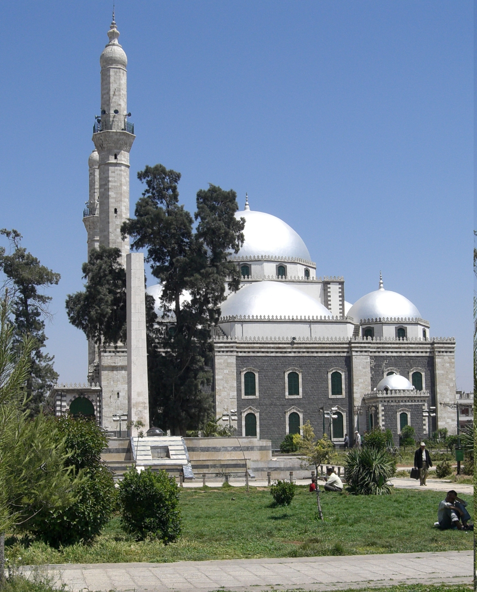 Ibn-Whalid-Moschee in Homs, Syrien